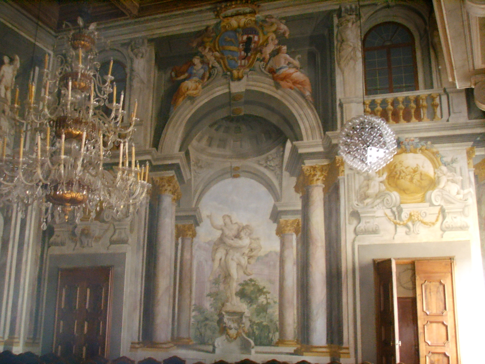 Palazzo incontri, sala affrescata 2